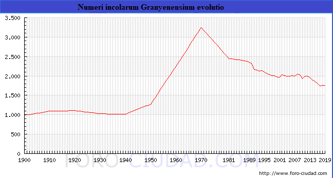 Numeri incolarum Granyenensium evolutio